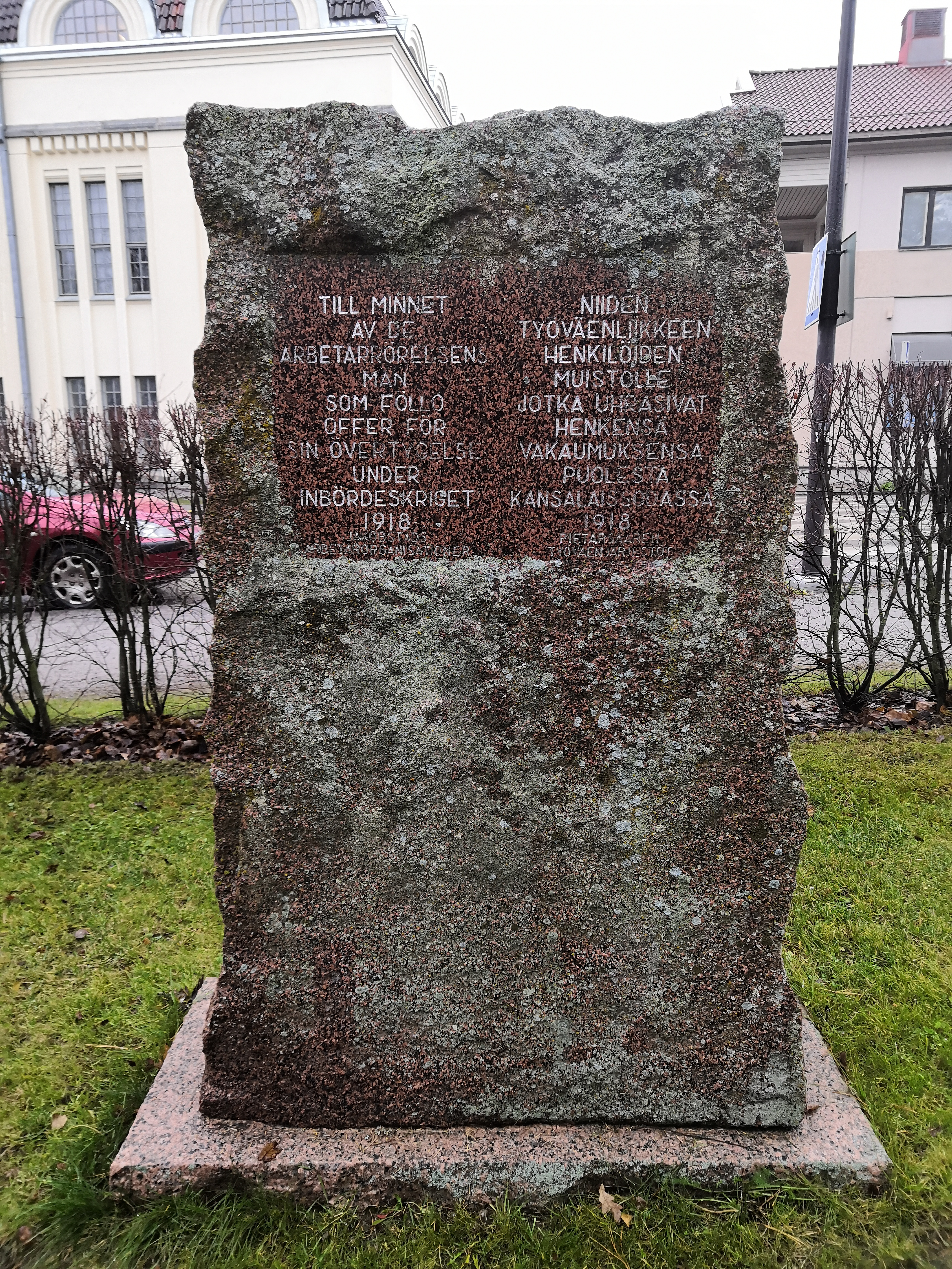 Pietarsaaren teloitukset tapahtuivat Suomen sisällissodan aikana 2. maaliskuuta 1918, jolloin joukko humalaisia tykistöjääkäreitä teloitti Pietarsaaressa kuusi paikallista työväenjärjestöjen jäsentä sekä heidän ampumistaan vastustaneen valkoisiin kuuluneen lakimiehen Johannes Jääskeläisen. Punaisten muistomerkki paljastettiin 1968 Koulupuistossa.